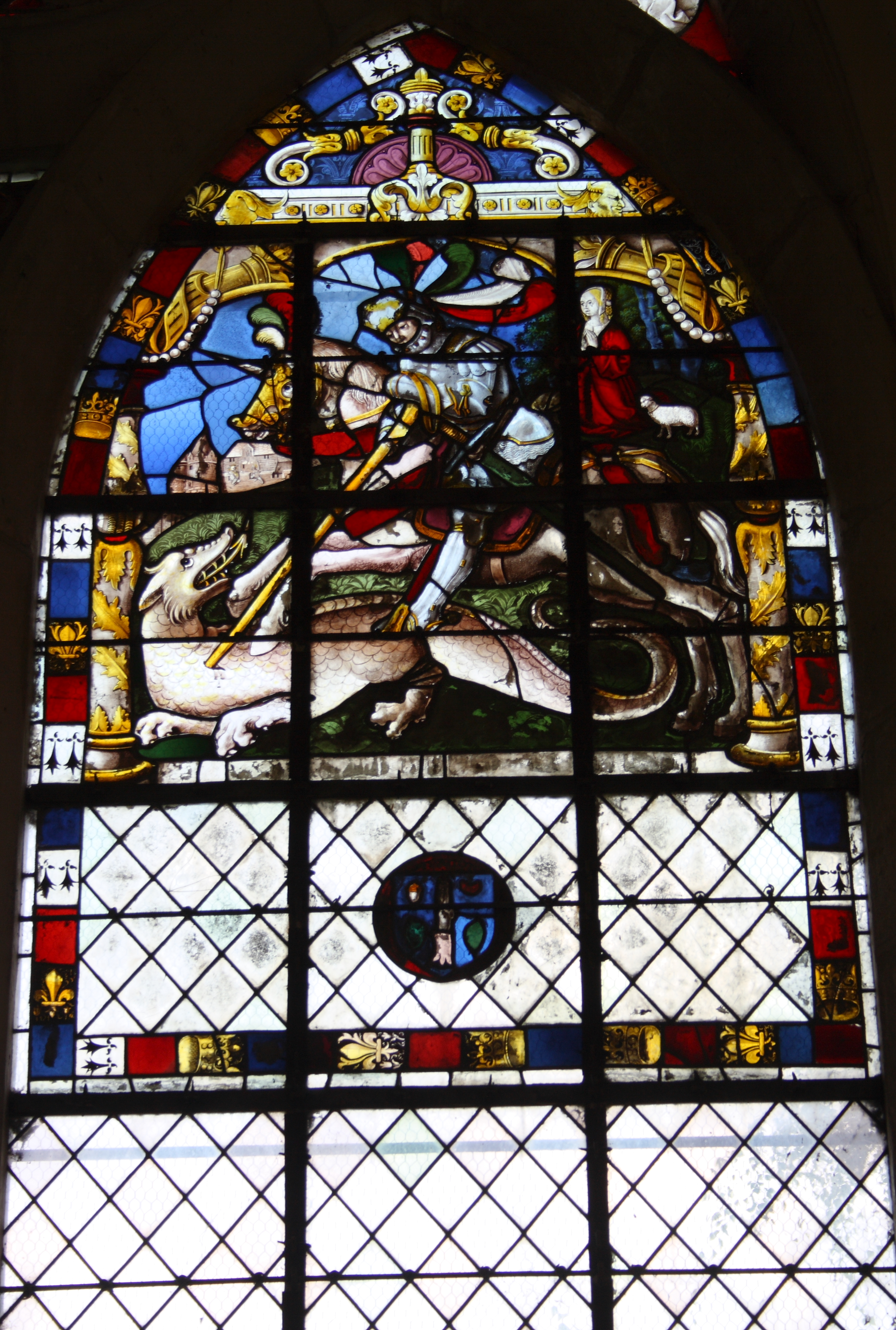 Ehemalige Kollegiatskirche Saint-Martin in Champeaux (Seine-et-Marne) im Département Seine-et-Marne in der Region Île-de-France (Frankreich), Bleiglasfenster aus dem 16. Jahrhundert, Darstellung: hl. Georg. Fenster n° 8 nach der Numerierung von G. Leroy, 1896 (siehe Plan).